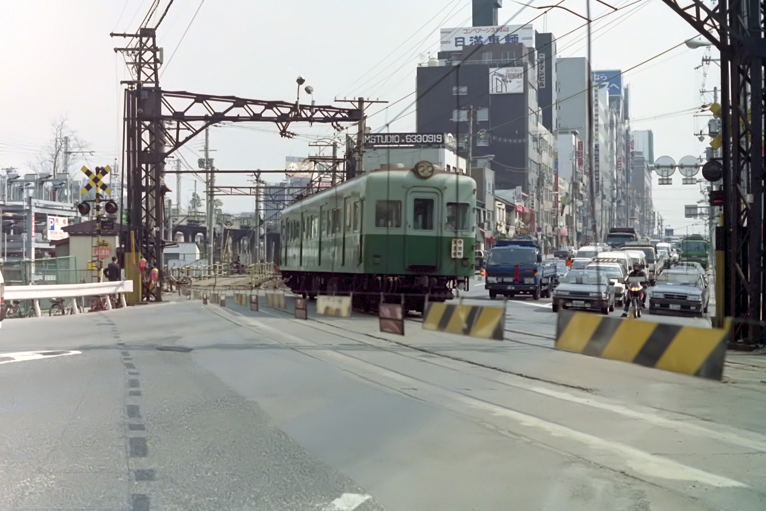 南海天王寺支線 天王寺－飛田本通